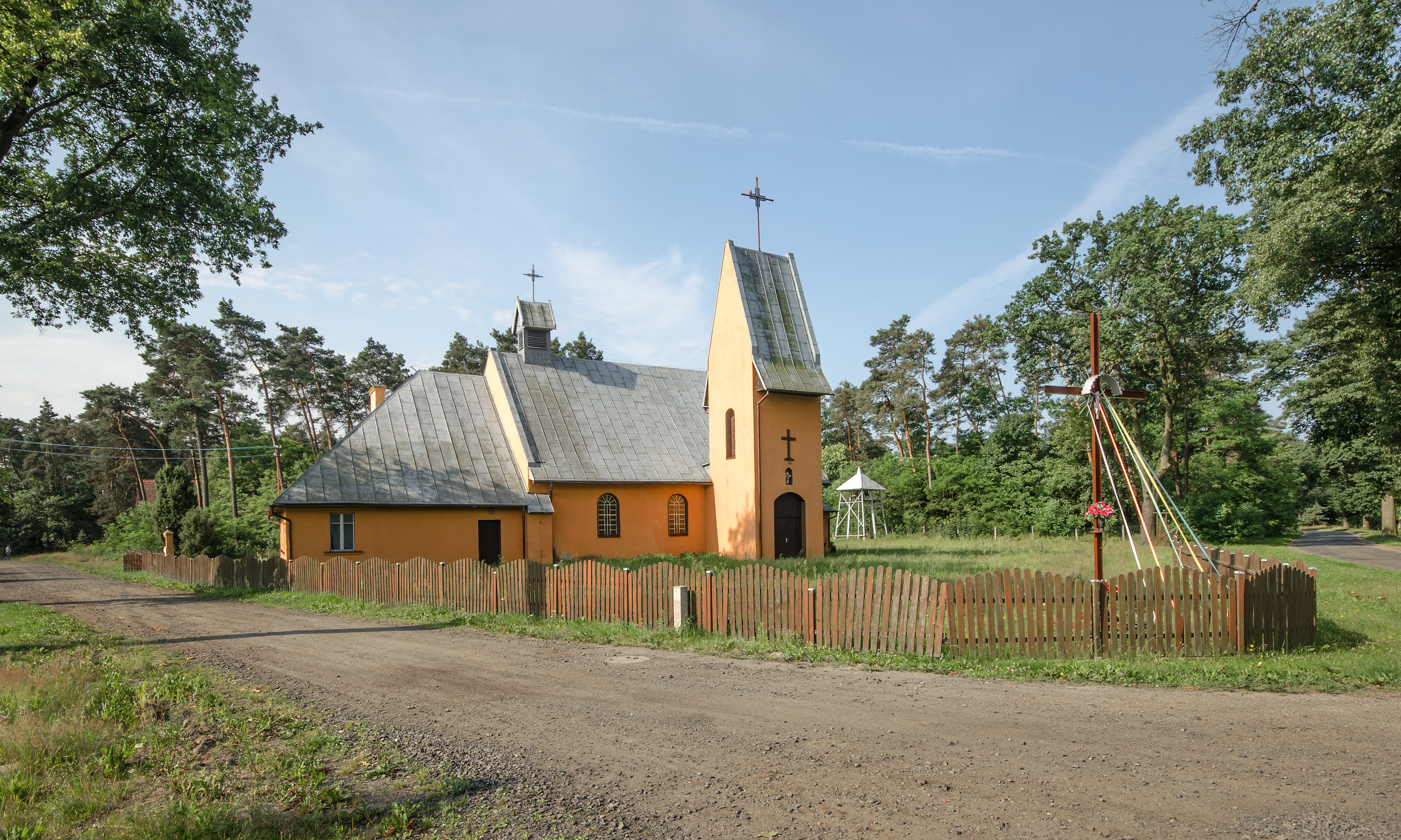 Kaplica Najświętszego Serca Pana Jezusa w Nowej Kuźni, woj. dolnośląskie, pow. bolesławiecki, gm. Gromadka